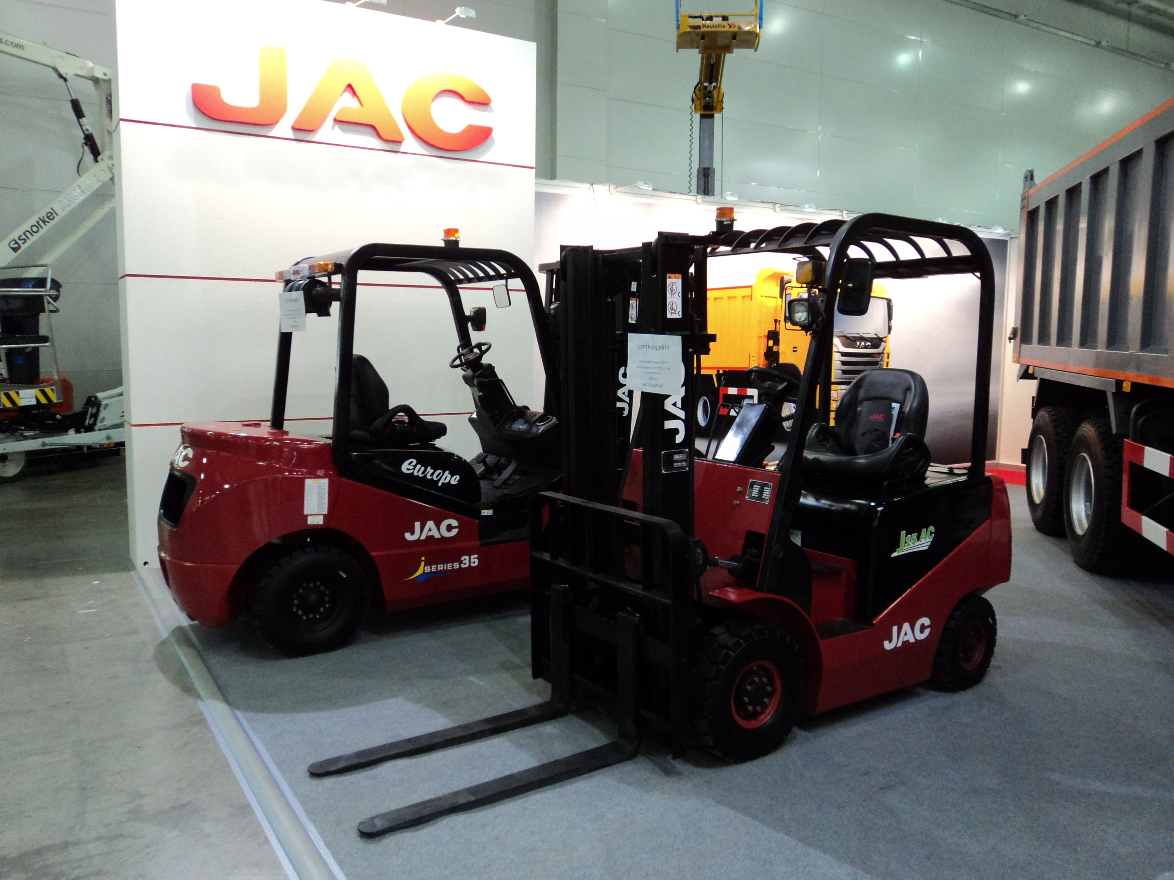 Выставка СТТ Уфа июнь 2013